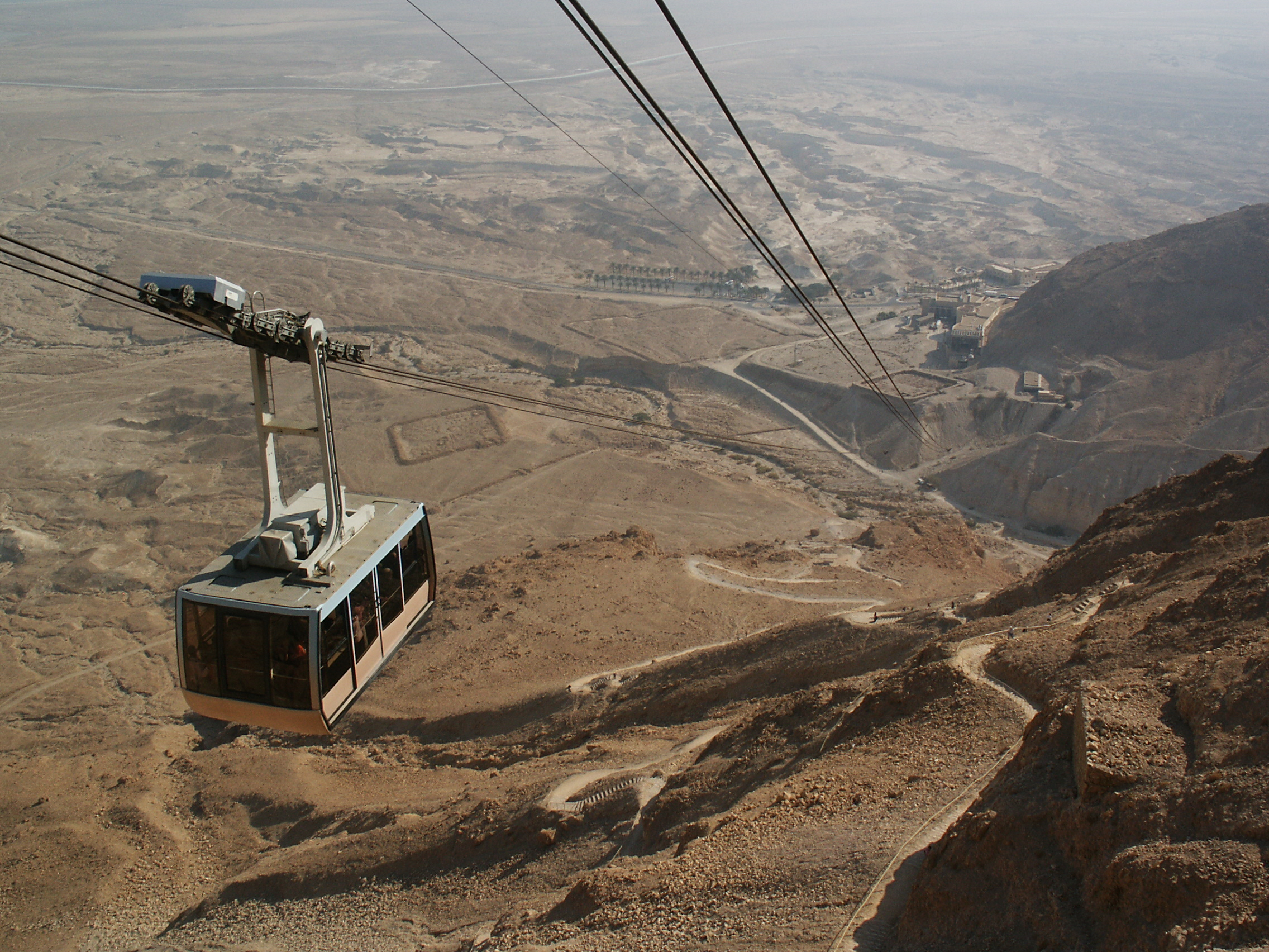 Cable Car to Masada, Israel